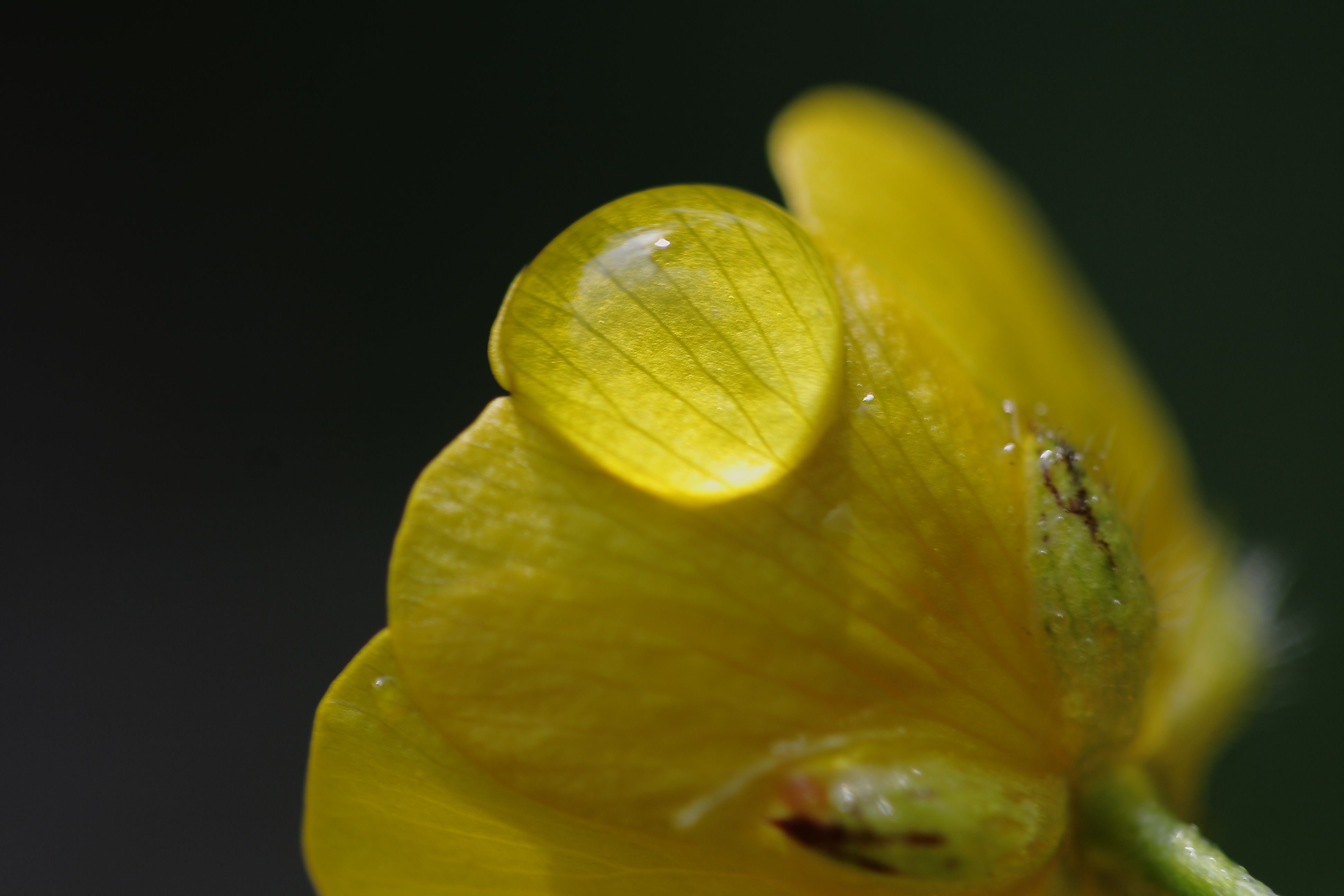 Scharfer Hahnenfuß (Ranunculus acris)